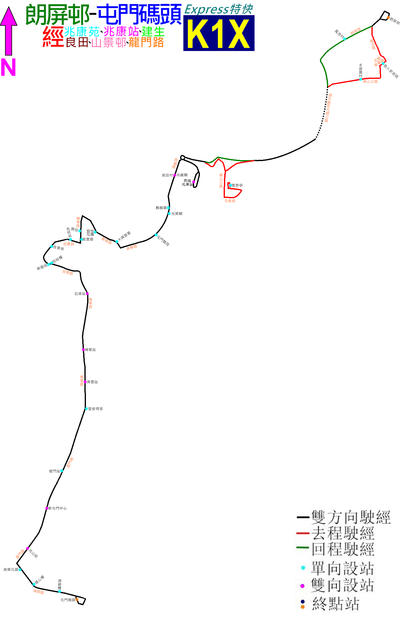 中文（香港）: 九鐵巴士K1X線取消前(雙向服務時)的走線圖